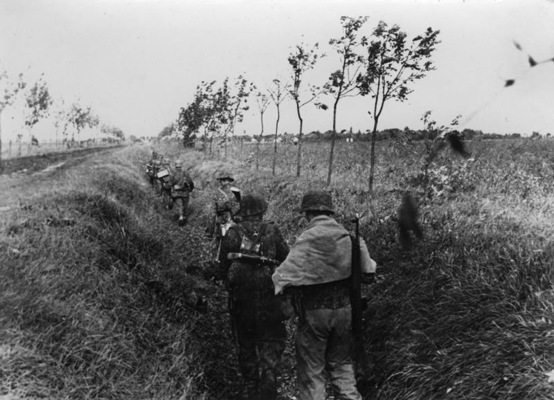 Vorstoß in der Pußta Der erste sowjetische Widerstand wurde bereits durch starkes Granatwerfer- und Infanteriegeschützfeuer gebrochen. Im Straßengraben entlang marschieren die Grenadiere [der Waffen-SS] weiter vor. 14.11.44 PK-Aufn.-Kriegsberichter SS - Alefs